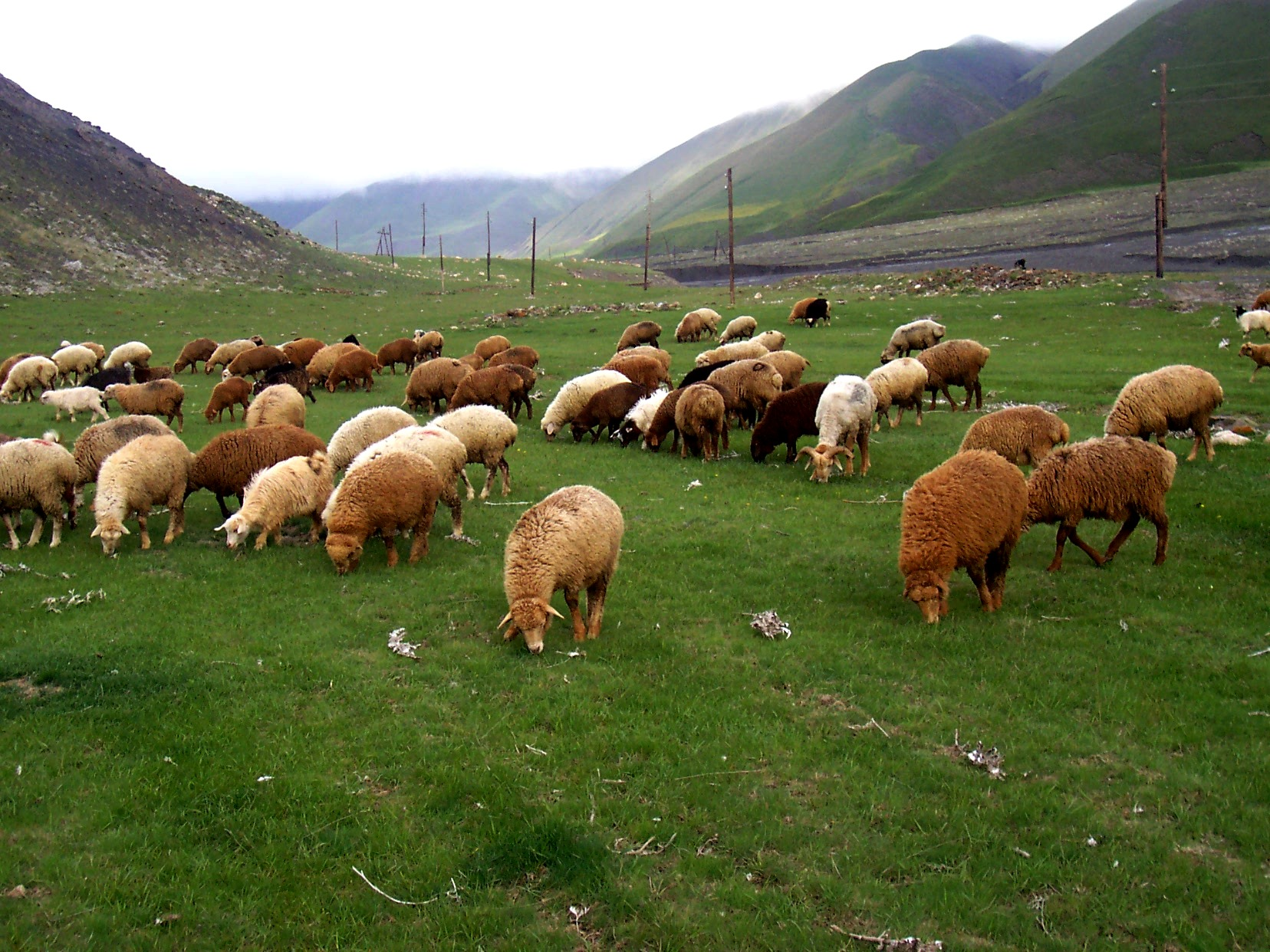 Xınalıqlıların qoyun sürüsü 15.05.2006